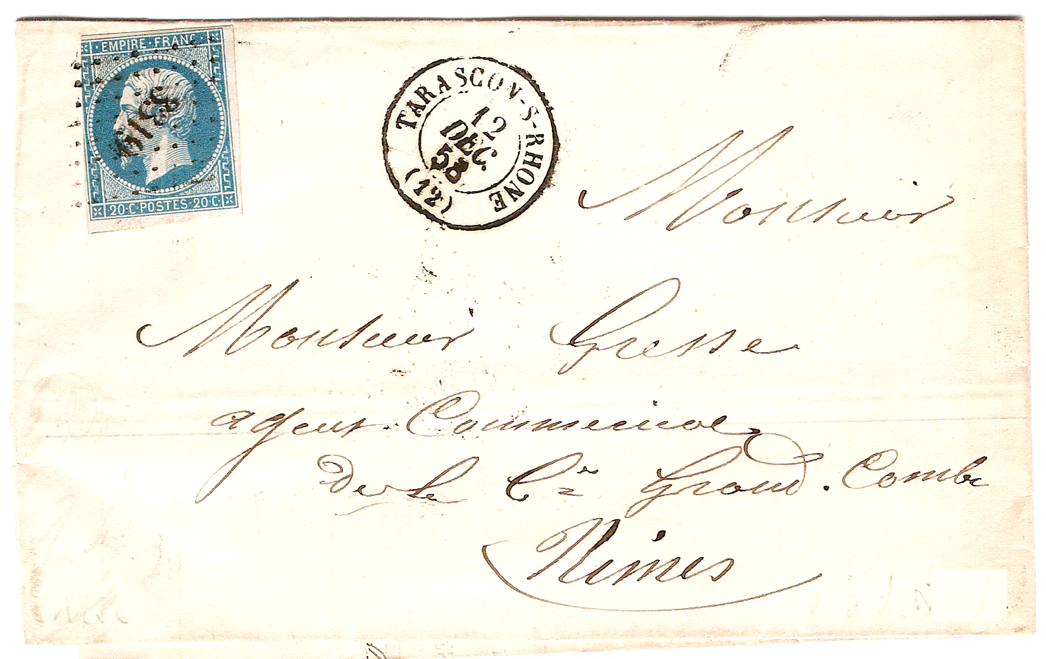 Lettre de France de 1858, affranchie avec un 20 c. Napoléon bleu de 1854, et oblitérée par un cahet petit chiffre 3319 de Tarascon (Bouches-du-Rhône)